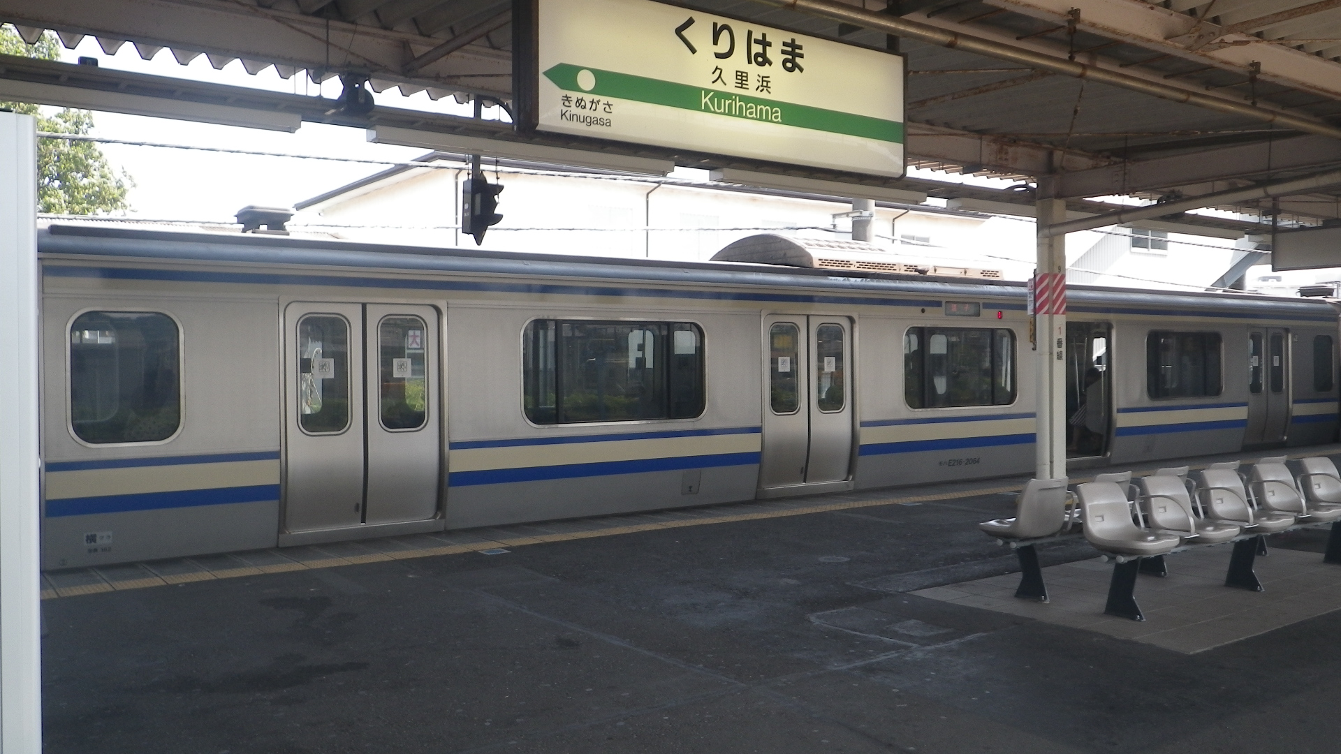 E217系の3/4閉スイッチを使用したドアカット